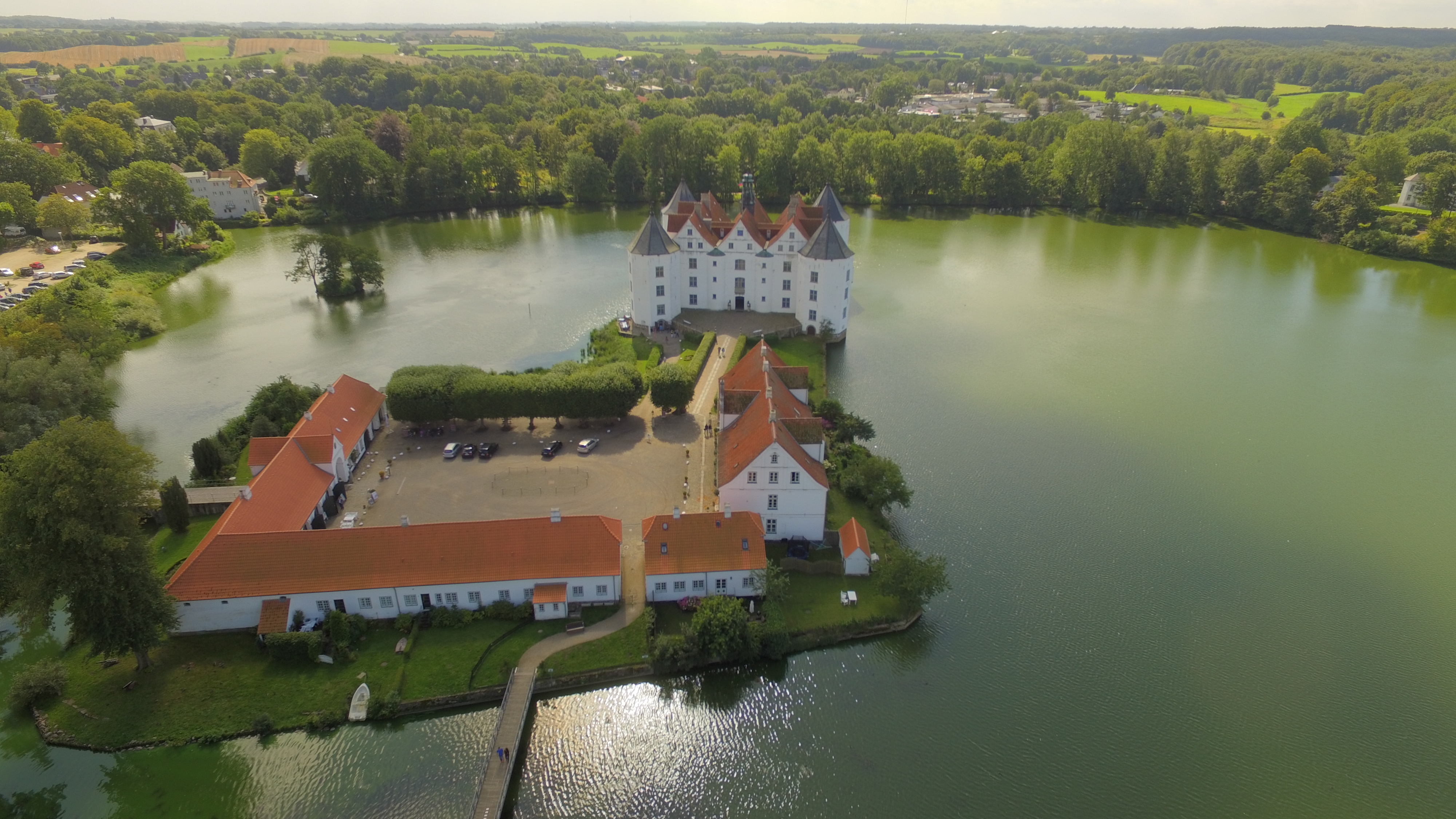 Luftaufnahme des Schlosses aus Richtung Nordost (Schlossgarten)